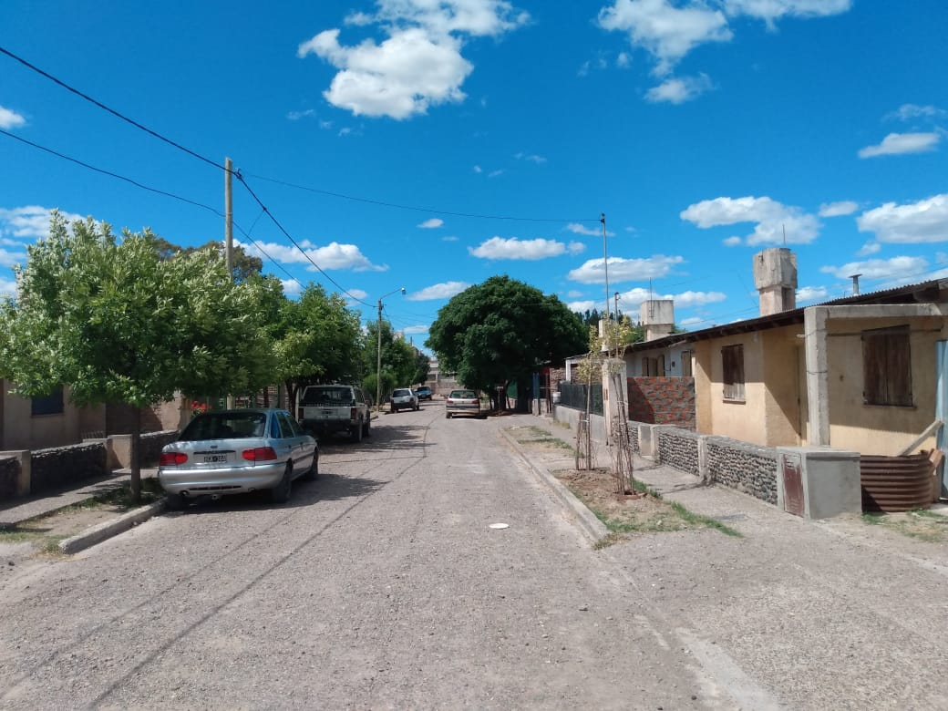 Pasaje Cabo Primero Jorge Adrián Arbeloa, ubicado en el barrio Primeros Pobladores.